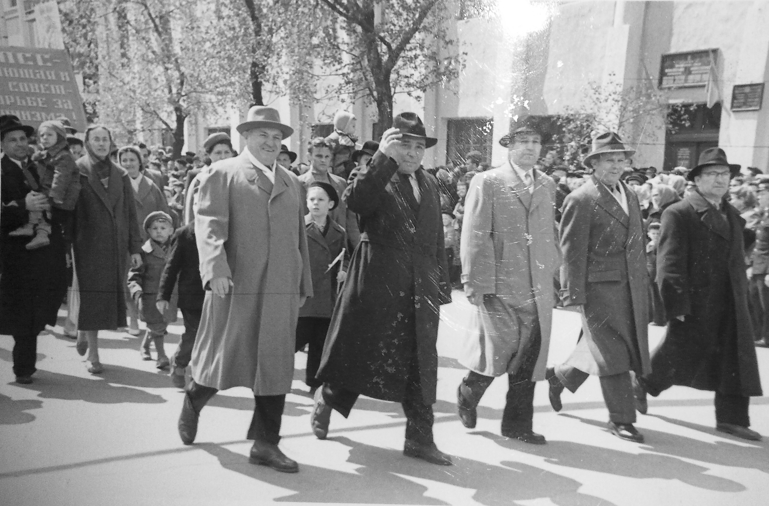 И. В. Бобров (второй слева) и сотрудники МакНИИ на демонстрации 7 ноября, 1961